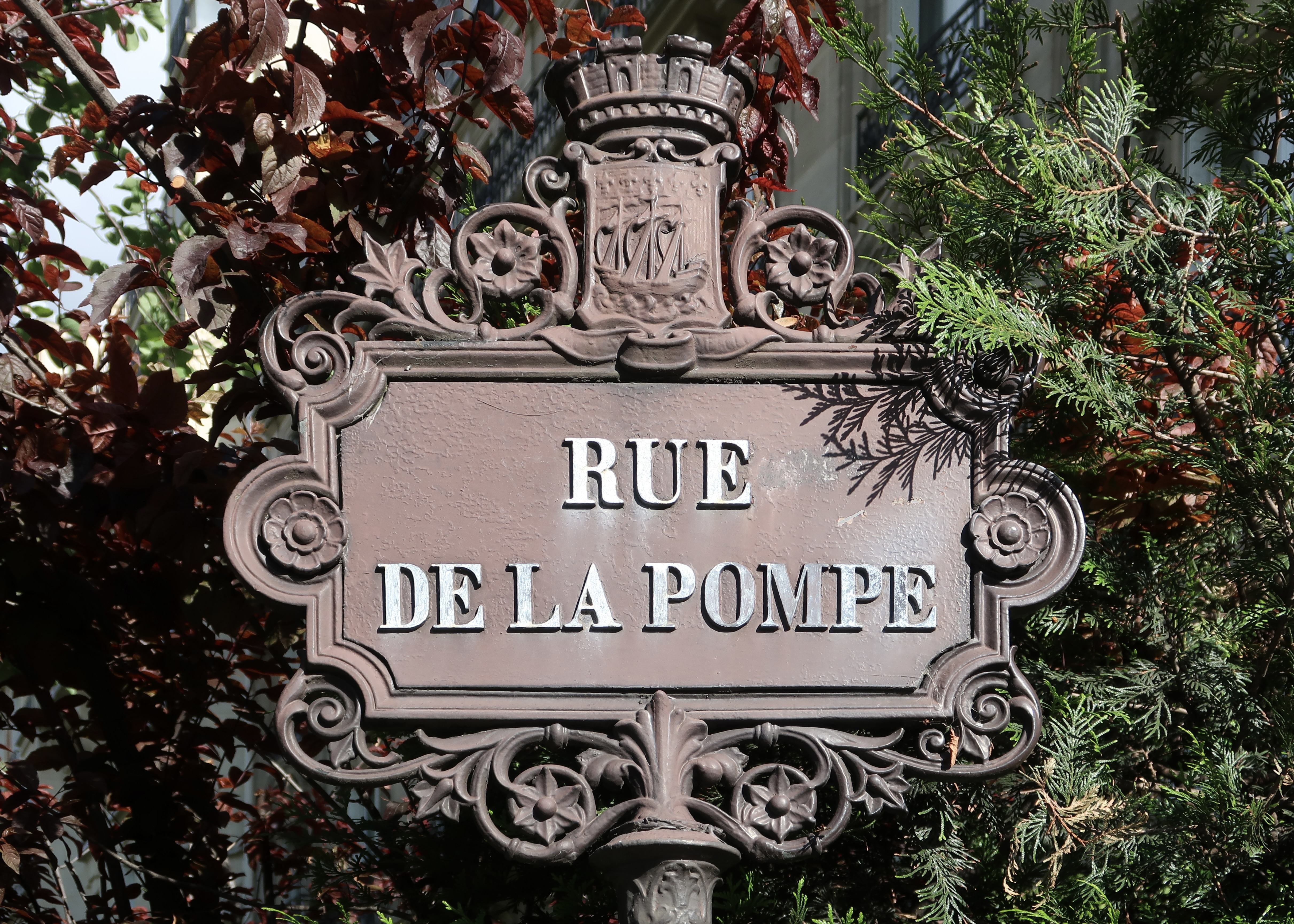 Plaque de la rue de la Pompe (Paris, 16e).